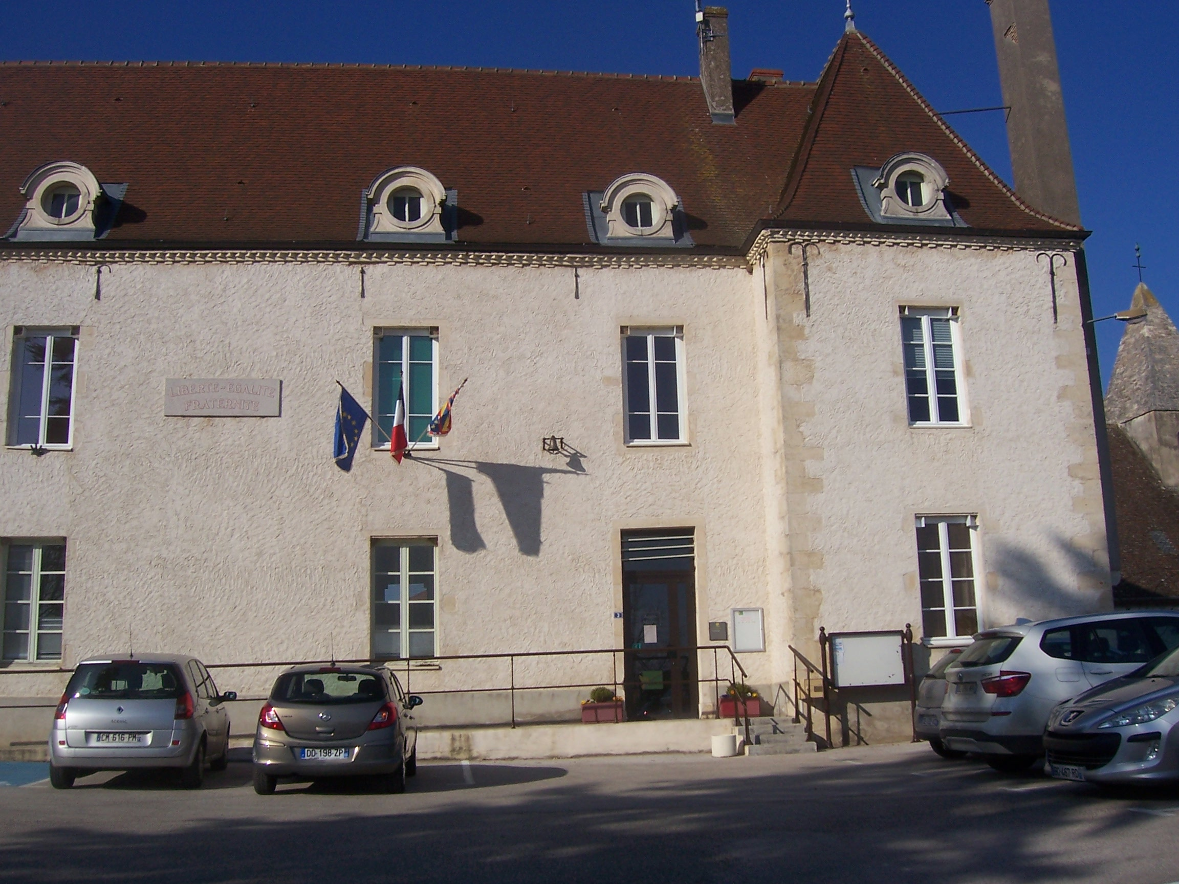 Mairie de Sassenay (Bourgogne)